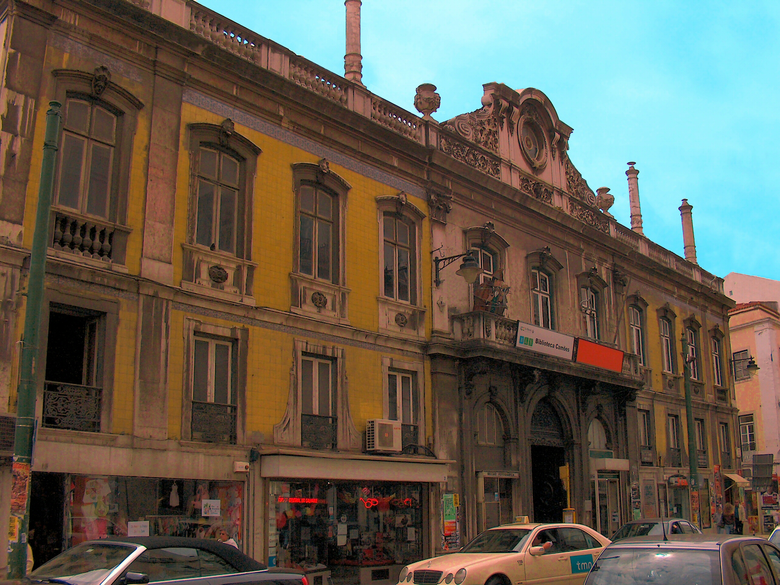 Palácio Valada-Azambuja. Fachada do Palácio Valada-Azambuja, Lisboa, Portugal.